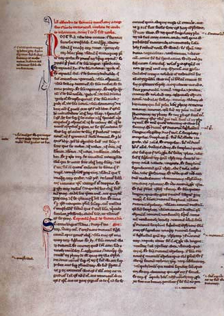 C'est à Tolède, dans la seconde moitié du XIIe siècle, que Dominique Gondisalvi, Marc de Tolède et Gérard de Crémone (1114-1187) traduisent en latin de nombreux ouvrages arabes scientifiques et philosophiques. Ce manuscrit, l'un des plus importants des traductions de Gérard de Crémone, comprend l'Énumération des sciences d'al-Fârâbî ainsi que des ouvrages de géométrie.